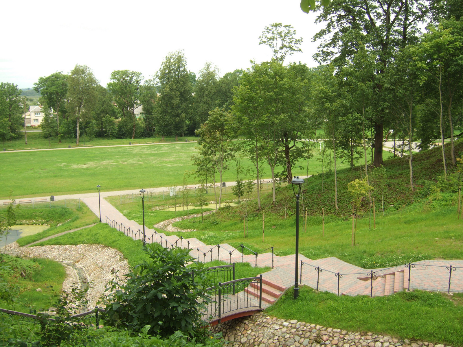 Salantų miesto parkas